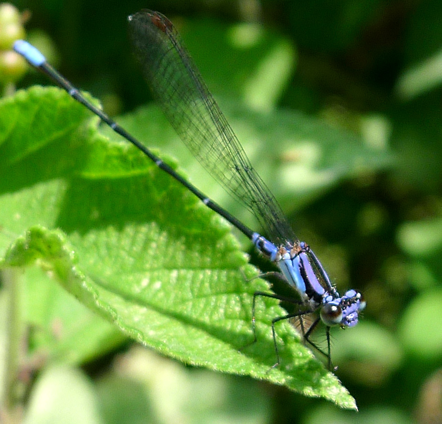 Argia frequentula ? Calvert, 1907. Coenagrionidae